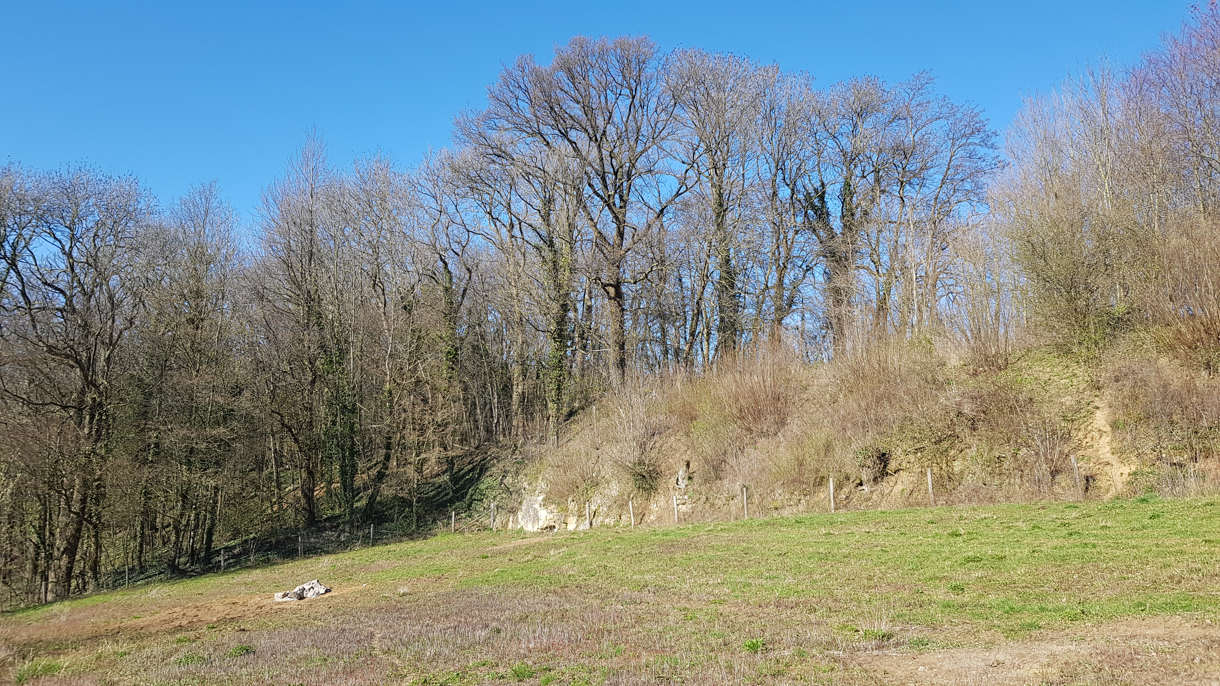 Groeve aan de Heide (Biebosch), Valkenburg, Nederland